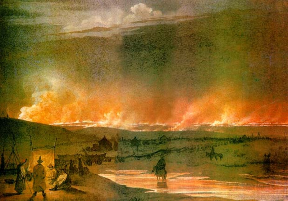 Steppen brand, Waterverf op papier, 1848.